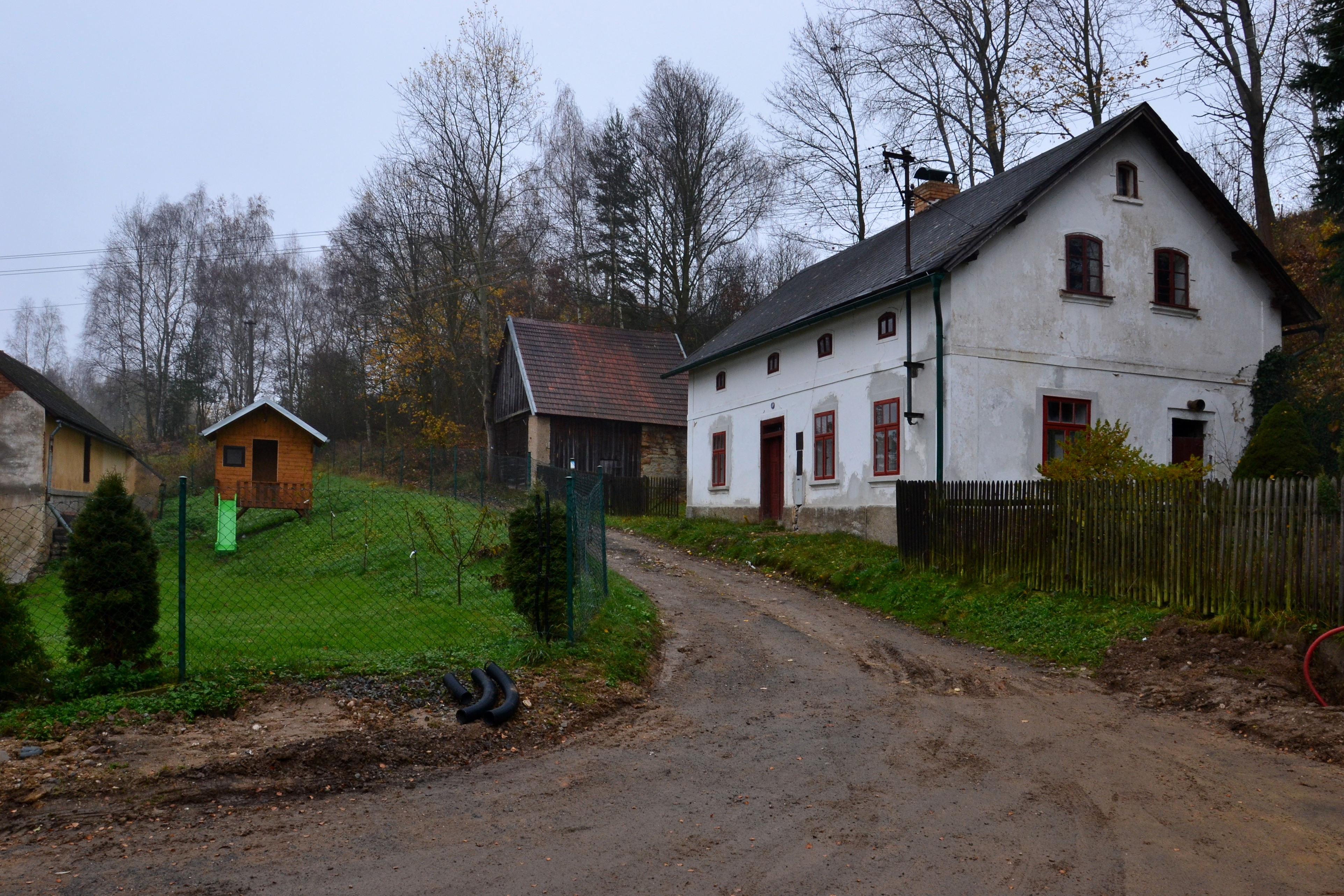 Lešovice čp. 10